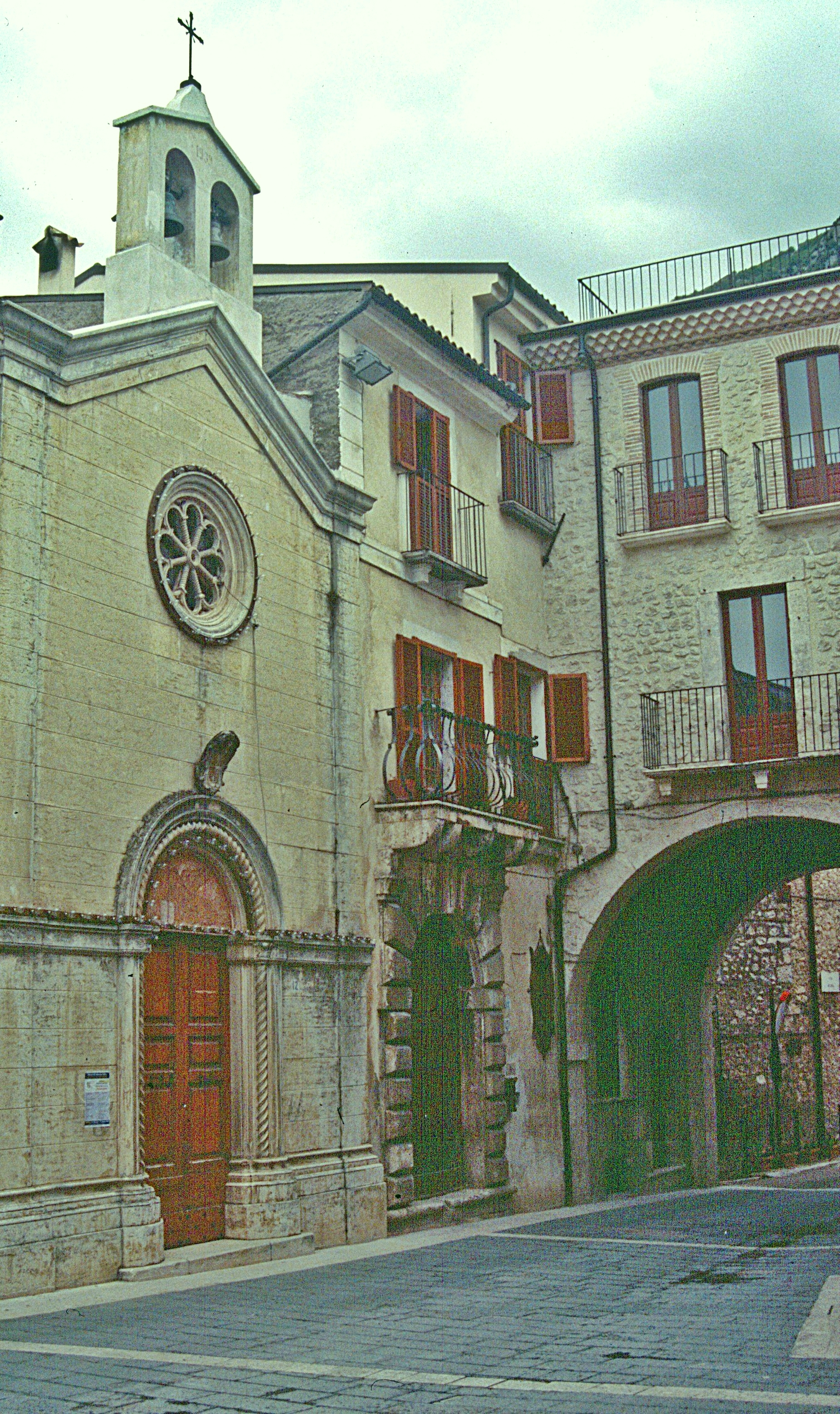 Pacentro